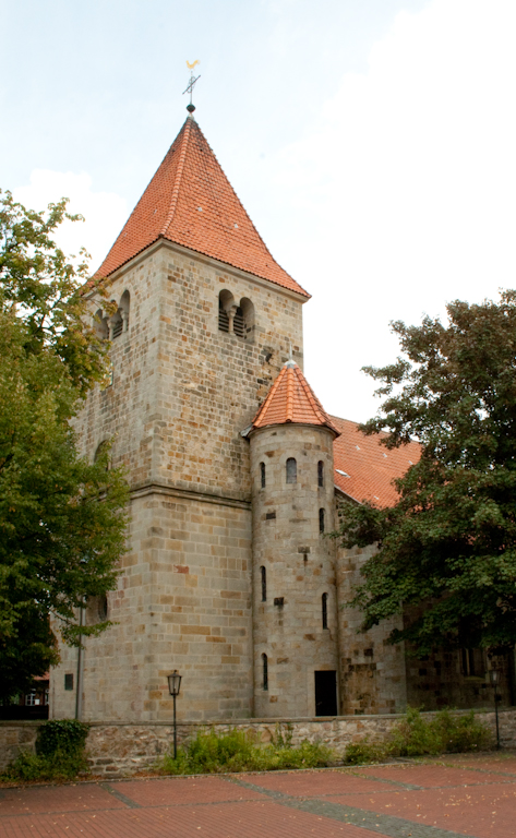 Kirche in Schale, NRW, Deutschland